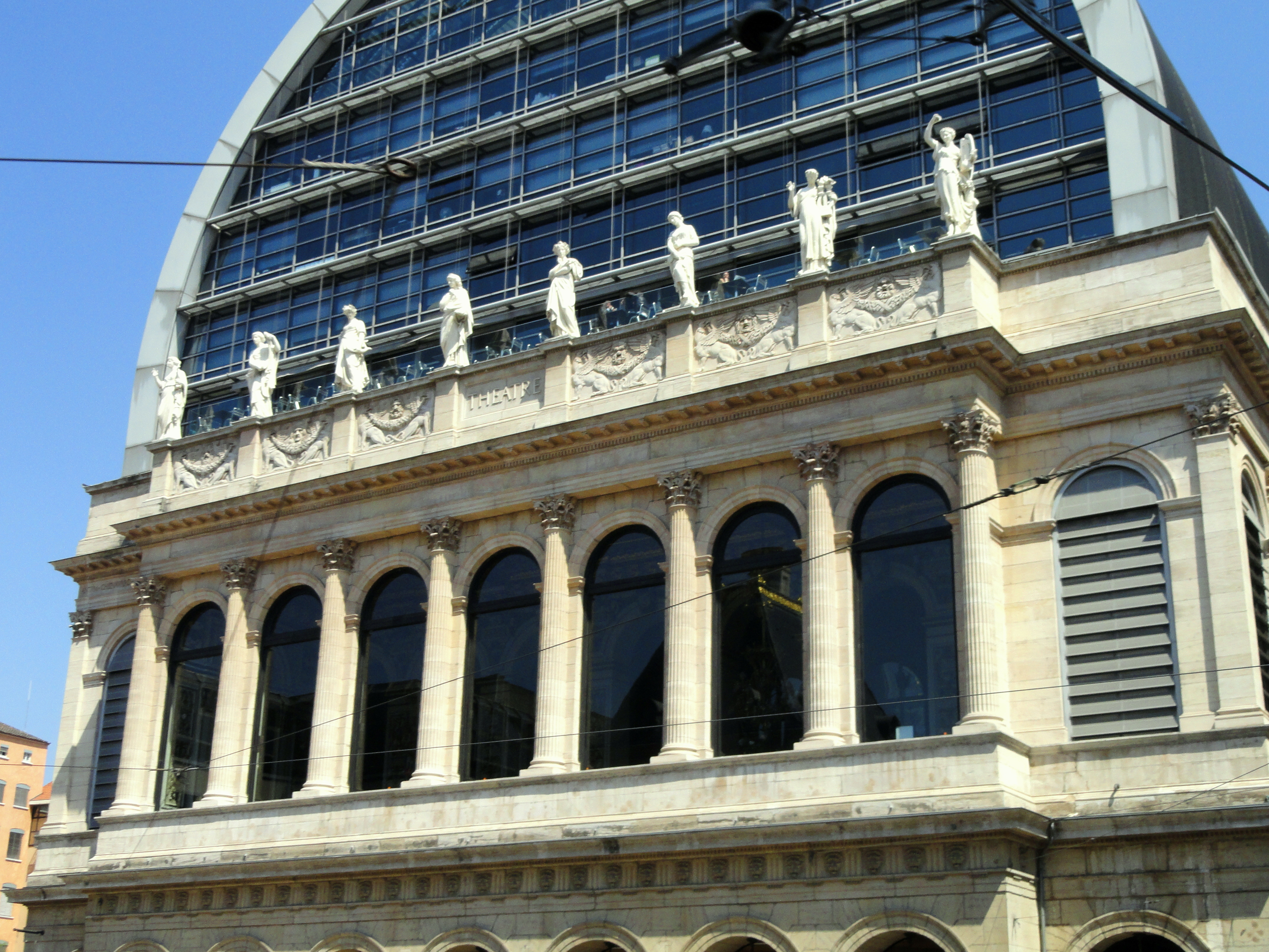 Opéra de Lyon, Lyon, France.